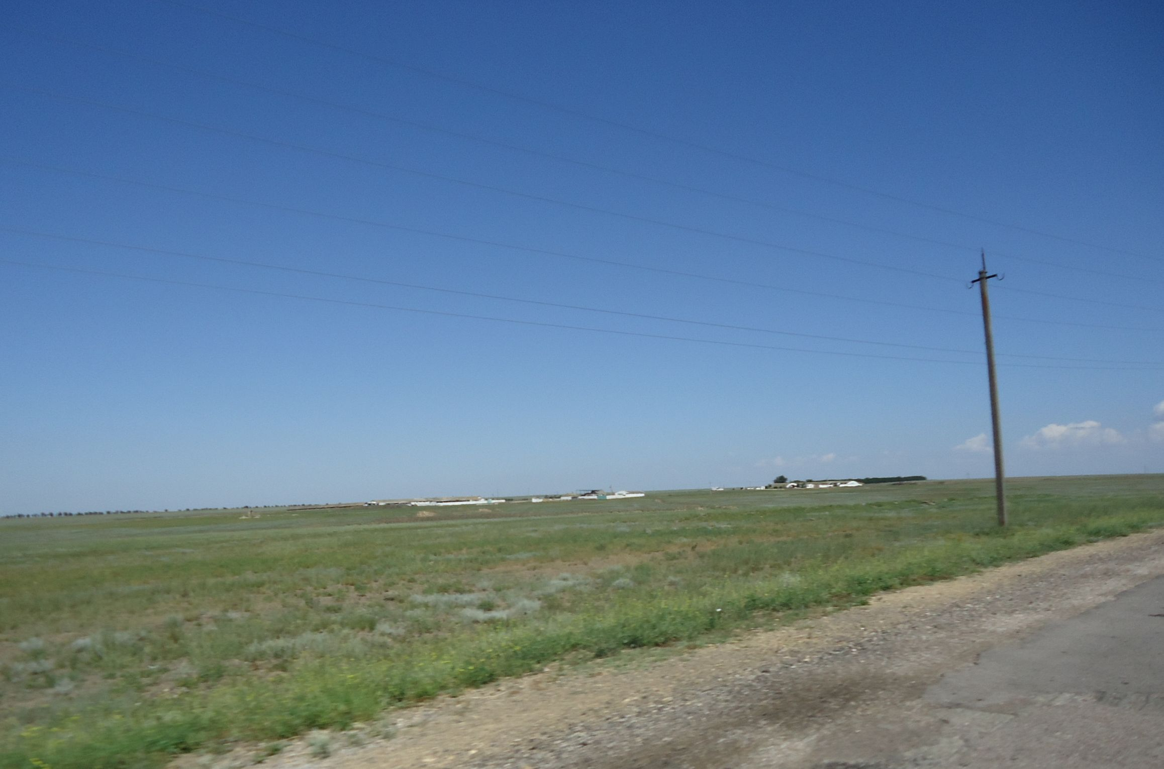 Ферма на месте бывшего села Баясыт Новый, Первомайский район, Крым.